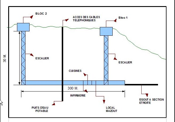 Plan de Profil de l'ouvrage de La Ferté.